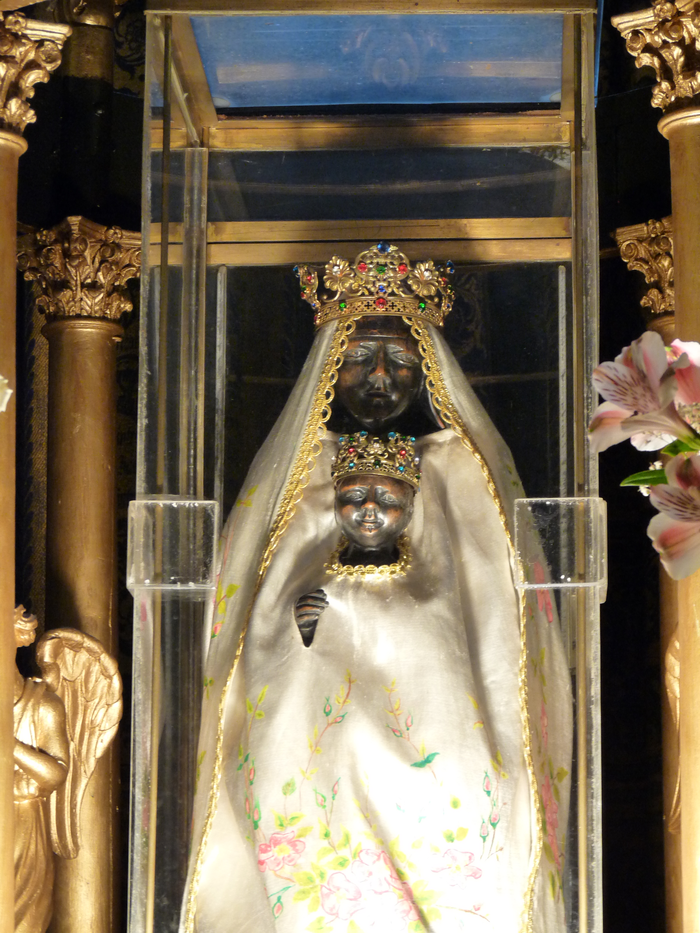 Notre Dame de Vassivière, vierge noire de l'église Saint André de Besse-et-Saint-Anastaise (Puy-de-Dôme).